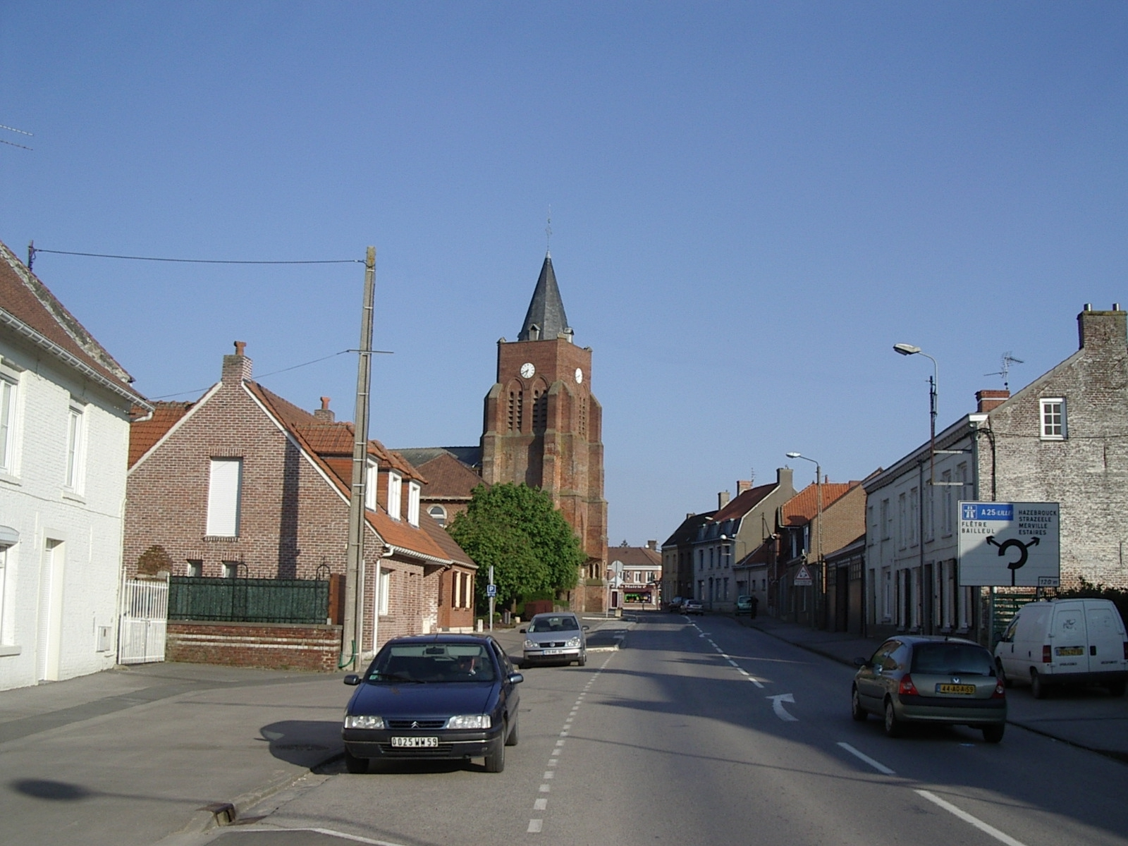 Le village de Caëstre (Nord, France)